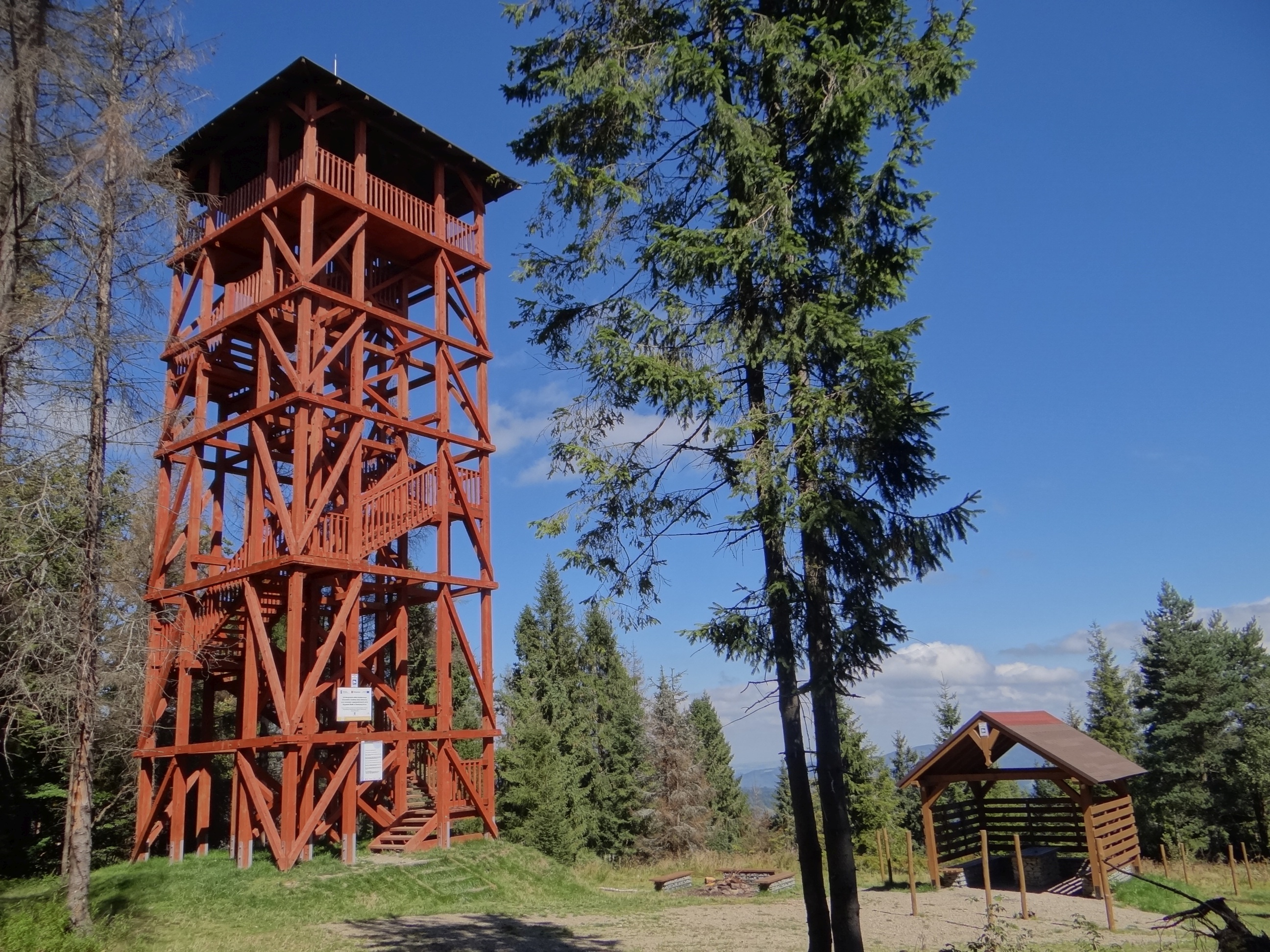 Na szczycie Eliaszówki. Wieża widokowa